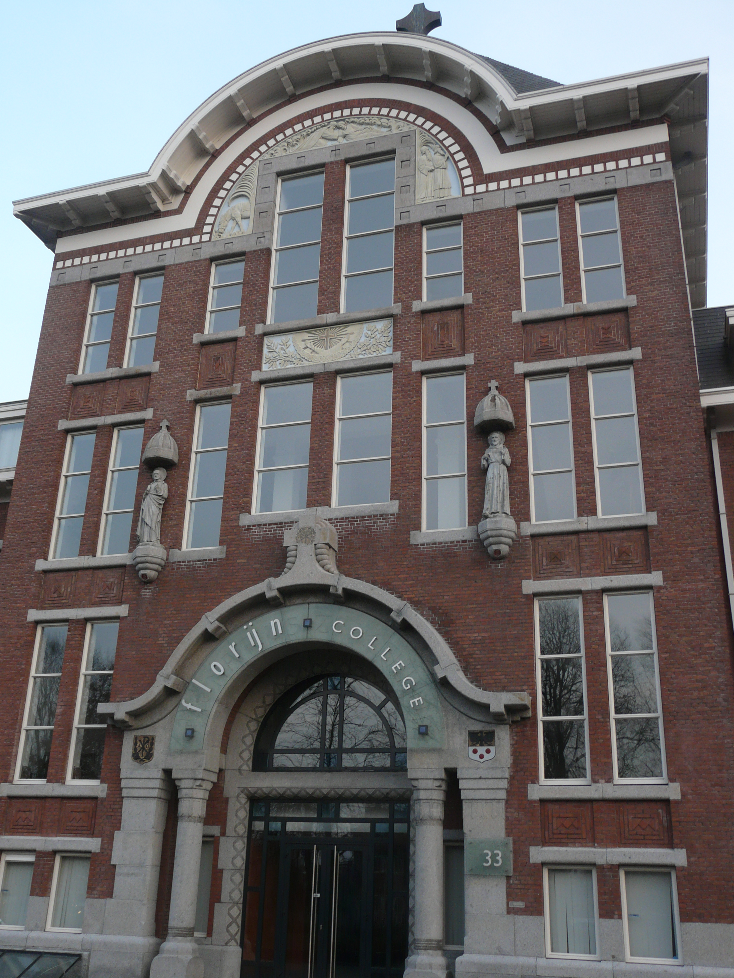 Facade voormalig St. Ignatius Ziekenhuis en ingang Florijn College in Breda Centrum in Breda